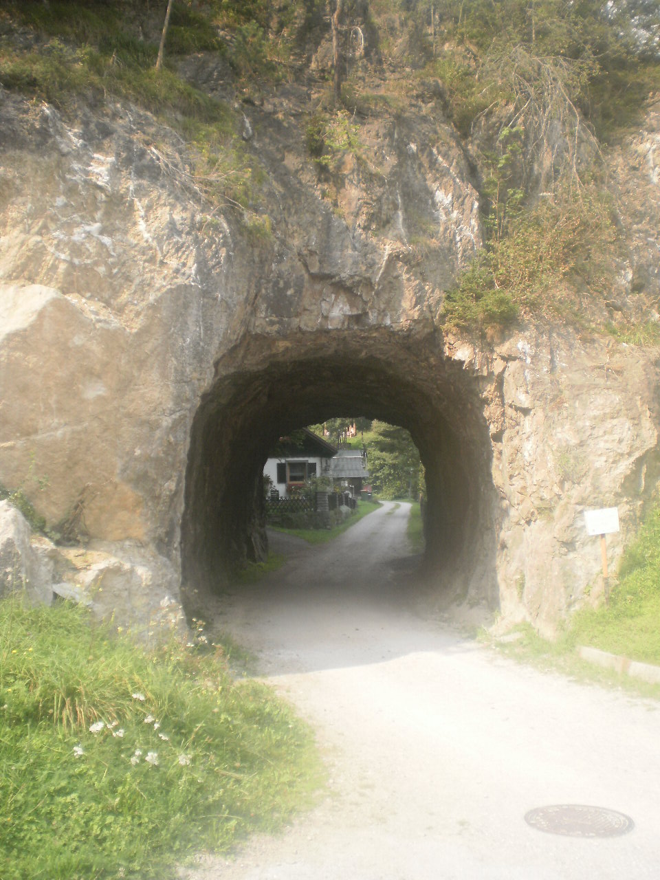 Festungsanlage, Pass Mandling. Der Tunnel wurde erst 1941 durch franz. Kriegsgefangene durchgebrochen. Es ist unklar, ob der Tunnel geschützt ist.